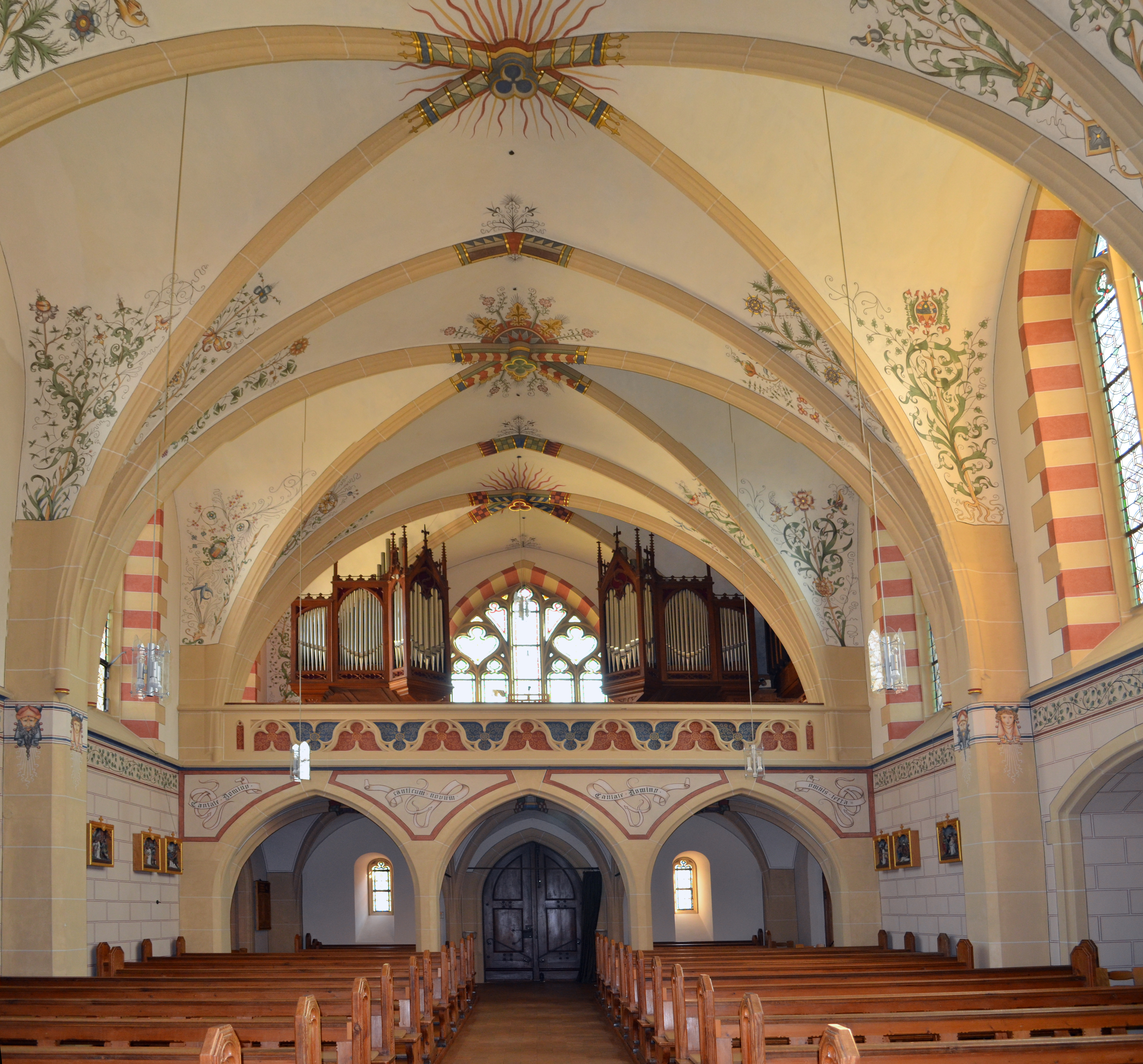 Guldental Heddesheim, Katholische Pfarrkirche St. Jakobus, Innen, Orgel